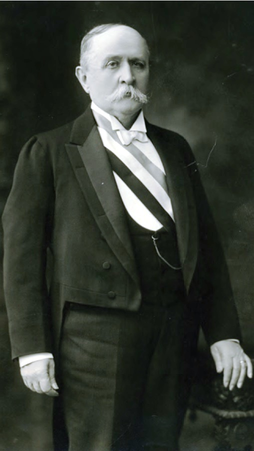 Ramón Barros Luco (Santiago, Chile, 9 de junio de 1835 – Santiago, 20 de septiembre de 1919) fue un abogado y político chileno, presidente de la República entre 1910 y 1915.